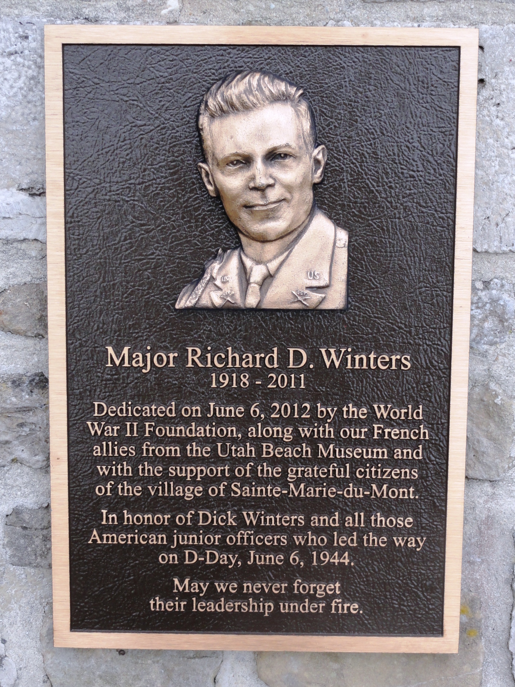 פרט מתוך האנדרטה לזכר וינטרס בנורמנדי